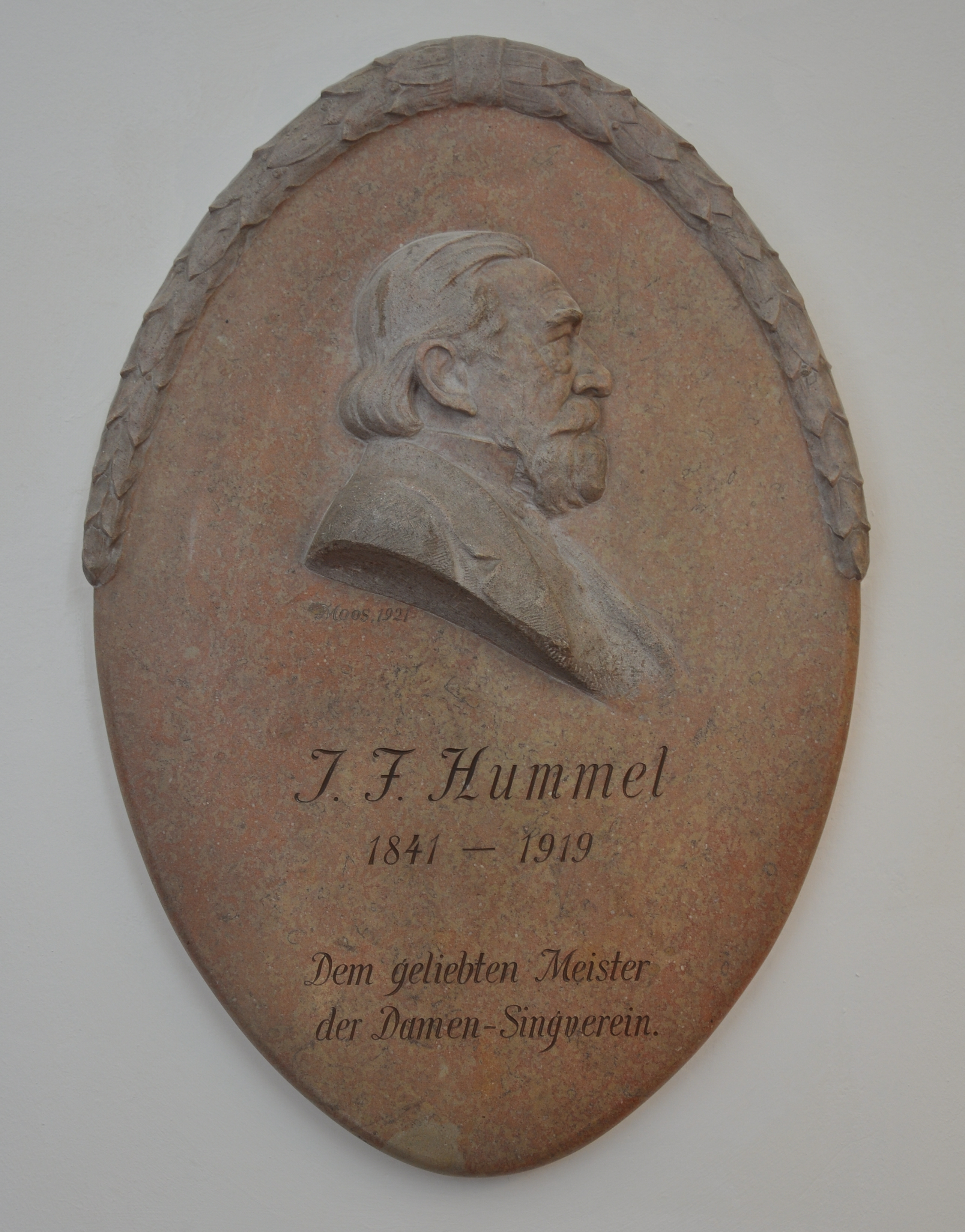 Salzburg, Mozarteum, Treppenhaus, Gedenktafel Josef Friedrich Hummel